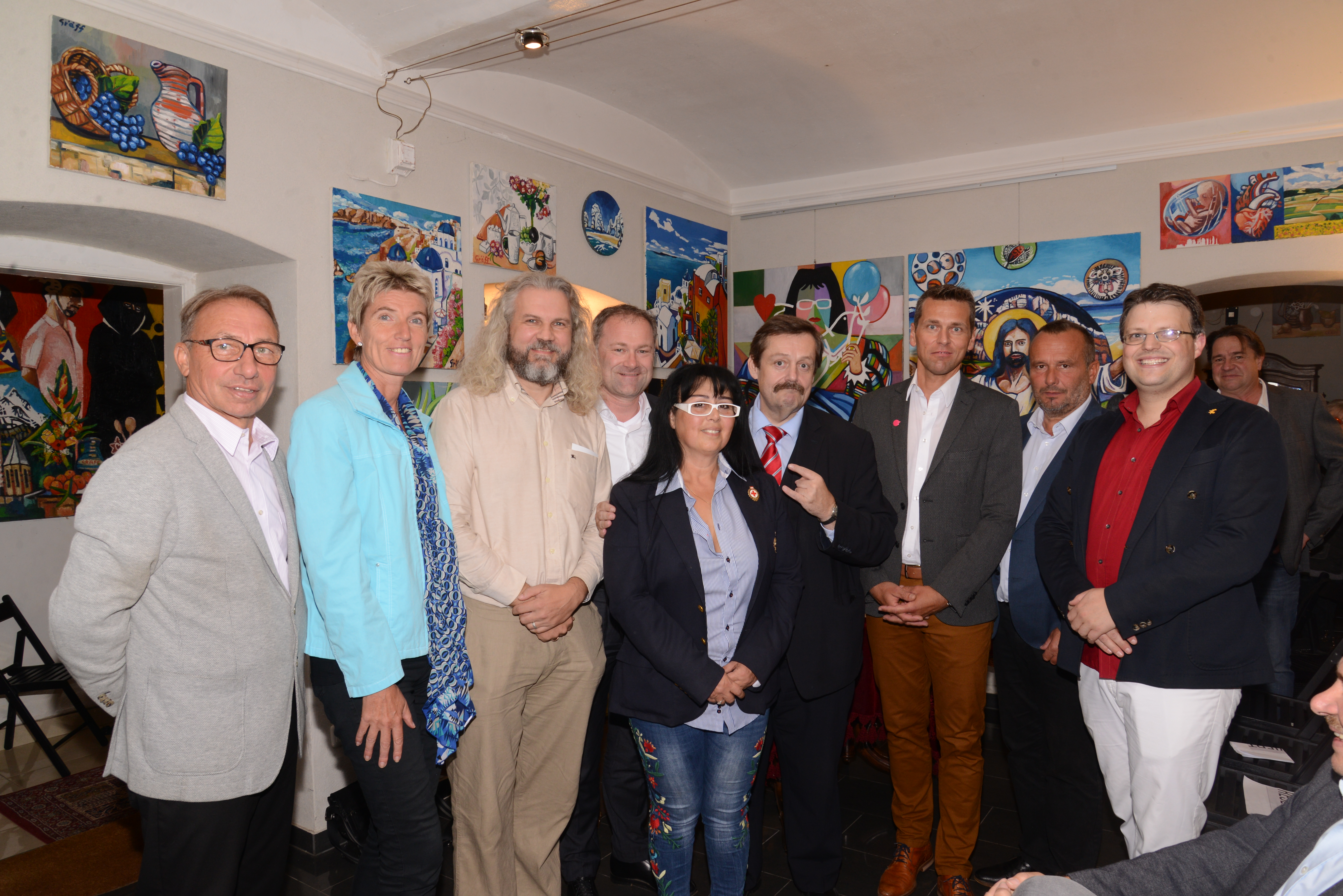 "Dialog im Kamptal - Politik näher bringen", veranstaltet durch Georgia Kazantzidu und Matthias Laurenz Gräff im Atelier Gräff in Zitternberg, Gars am Kamp, 10. 9. 2019 vortragende Diskutanten: Herbert Kolinsky (NEOS), Dir. Günter Steindl (SPÖ), NR Martina Diesner-Wais (ÖVP), Martin Litschauer (Die Grünen), Ehrengast Werner Gruber (SPÖ) Moderation durch LAbg. Josef Wiesinger (SPÖ), Mitglied des Bundesparteivorstandes, Stellvertretender Landesparteivorsitzender Personen am Foto: Josef Wiesinger, Martina Diesner-Wais, Martin Litschauer, Günter Steindl, Georgia Kazantzidu, Werner Gruber, Herbert Kolinsky, Alois Kainz, Matthias Laurenz Gräff